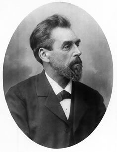 Bildnis des Gartenarchitekts Andreas Weber 1831-1901